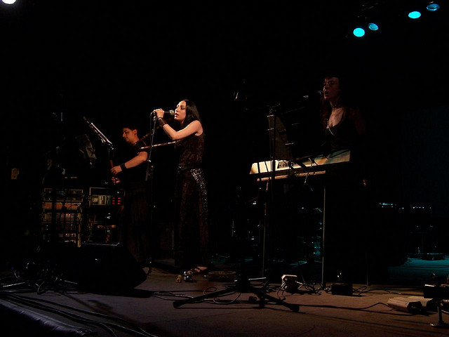 Trobar de Morte